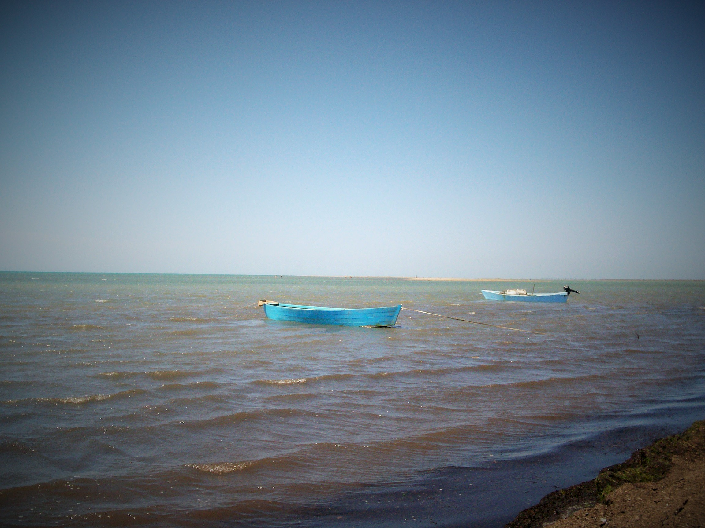 Divjake-Karavasta, Lushnje,Fier, Kavaje